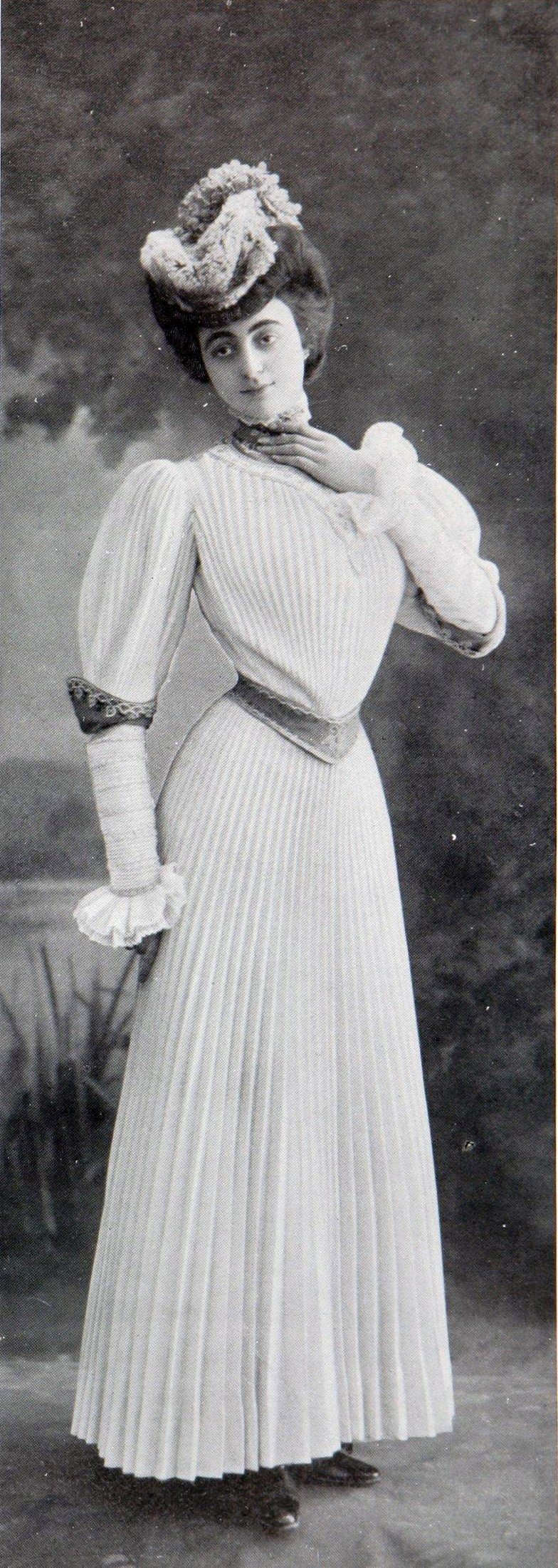 "Trotteur Riviera — Robe en serge blanche, plissé soleil. Col, parements et ceinture en drap beige brodé. Garniture de dentelle". Photographs in Les Modes : Revue mensuelle illustrée des arts décoratifs appliqués à la femme.